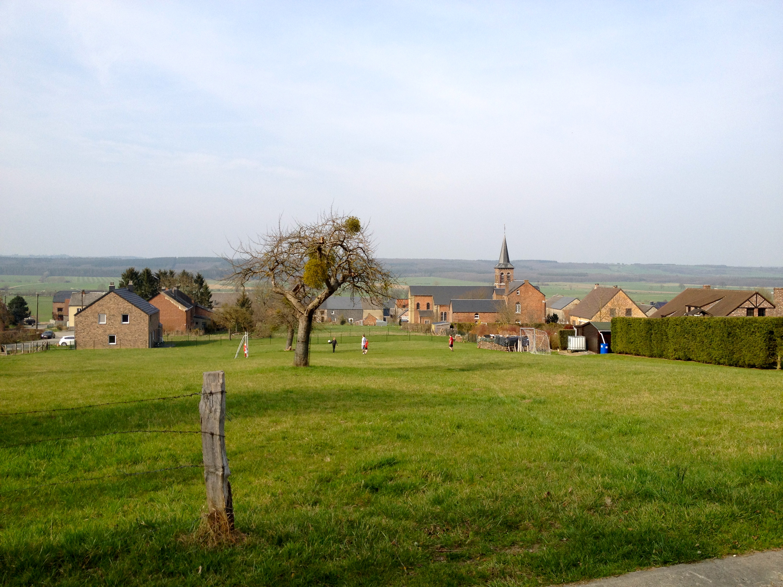 Le village de Martouzin, dans la commune de Beauraing (Belgique).